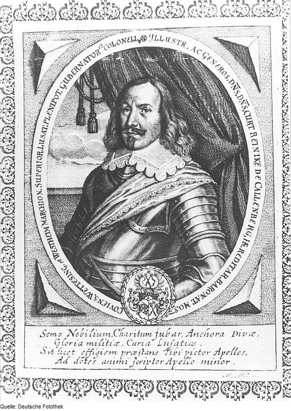 Original image description from the Deutsche Fotothek Bad Muskau. Curt Reinicke I. Freiherr von Callenberg, aus: Graf von Arnim/Boelke 1979